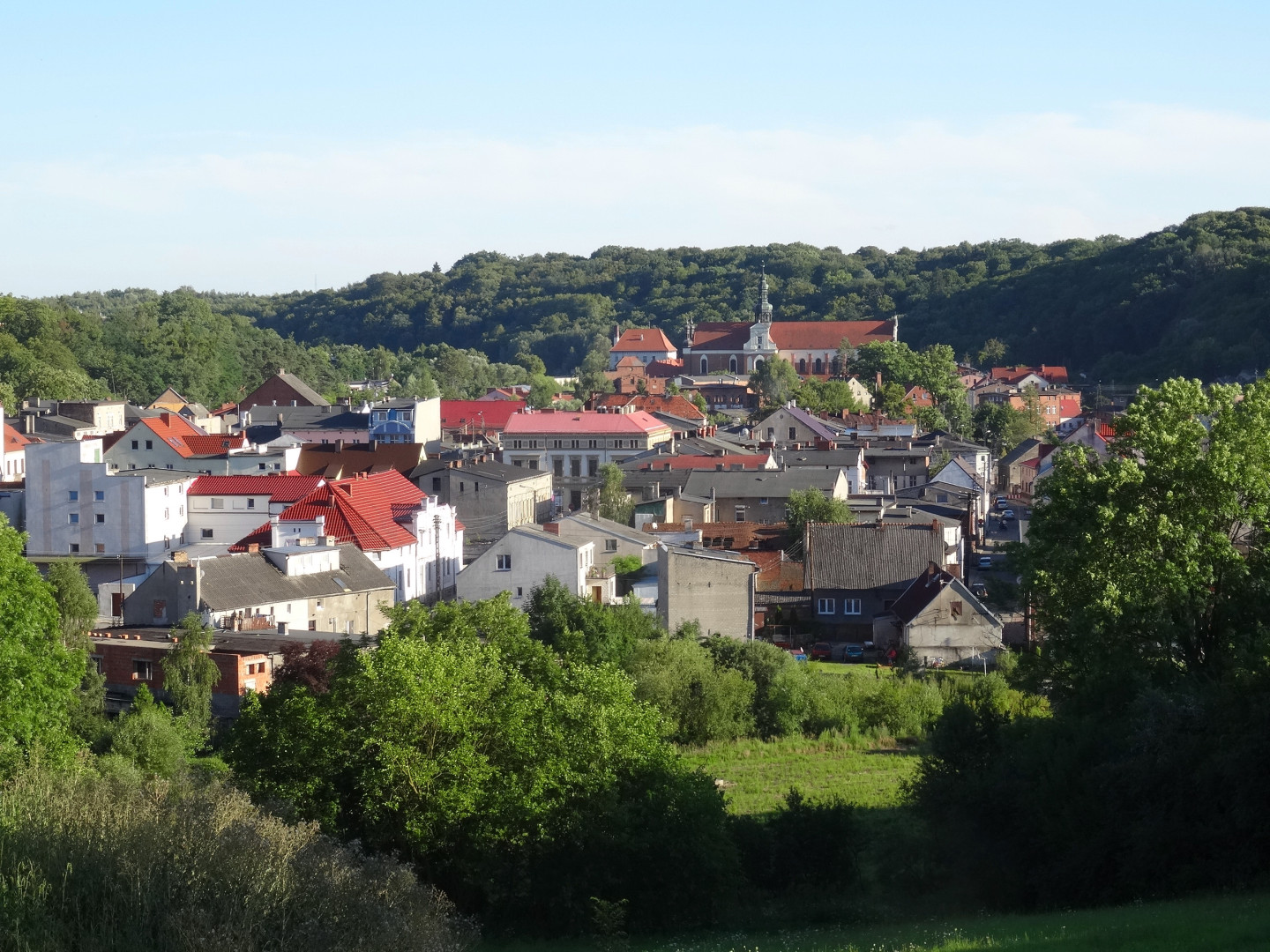 Panorama Koronowa z krawędzi doliny Brdy na północ od miasta